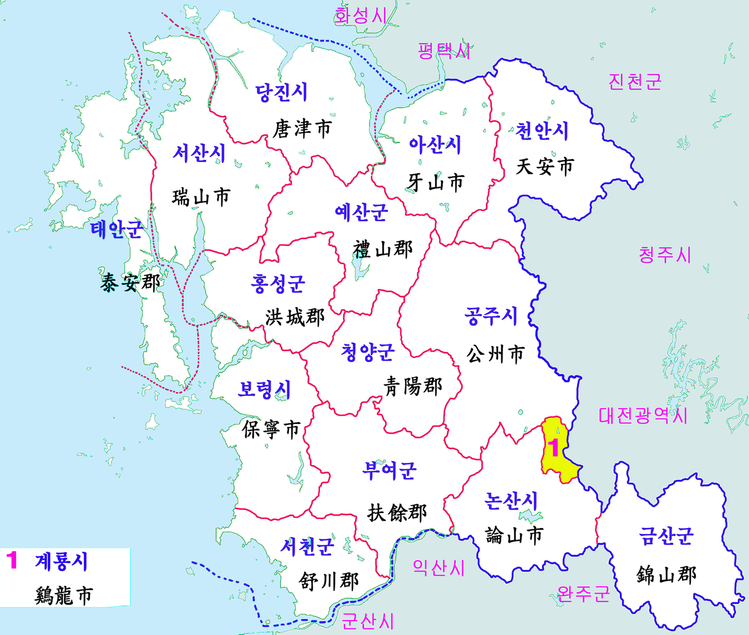 大韓民国忠清南道2012年8月4日現在の行政区画図